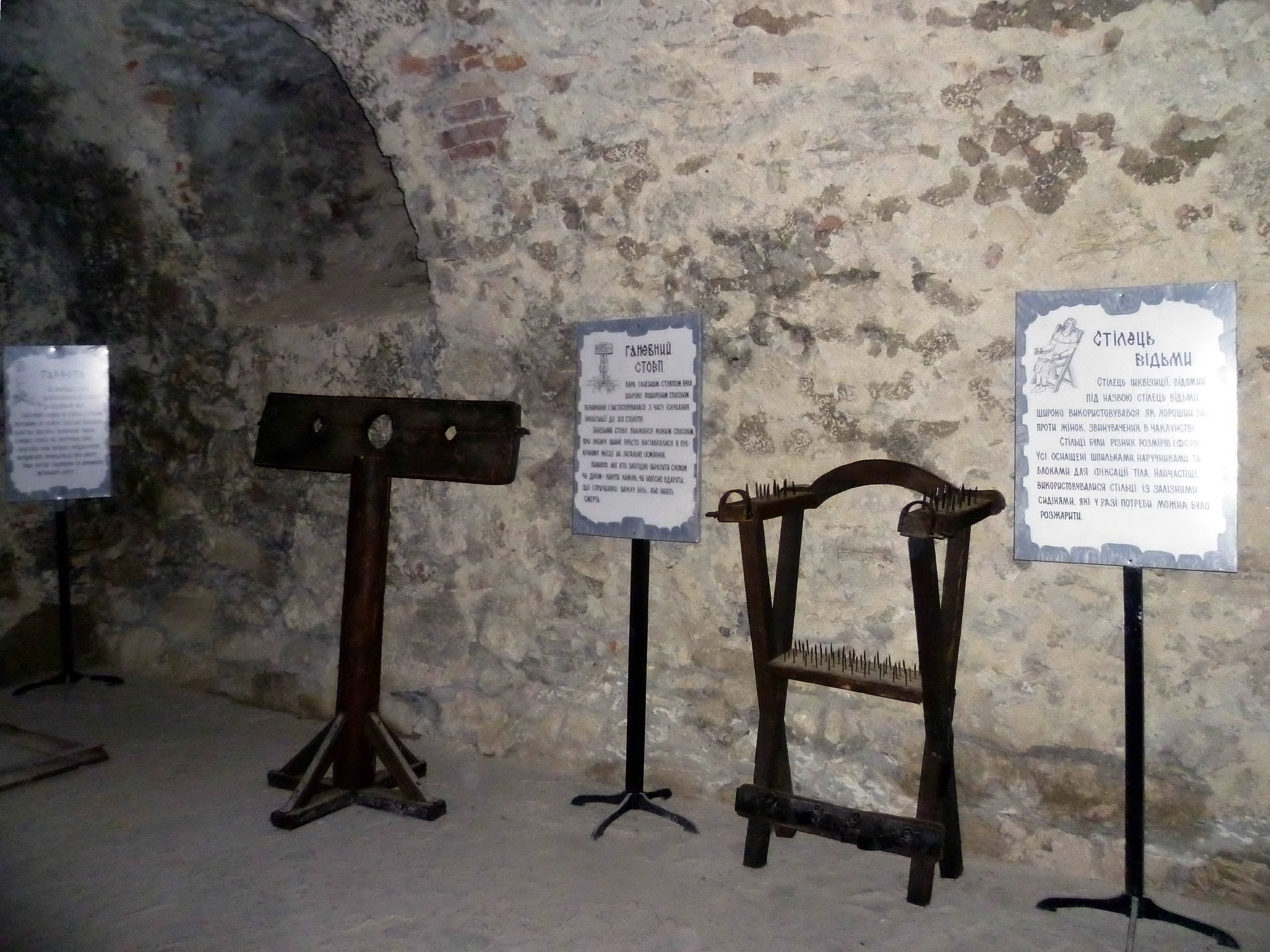 Замок (1631 р.) - експозиція виставки знарядь тортур - м.Збараж (вул. Морозенка, 38) Тернопільська область Україна